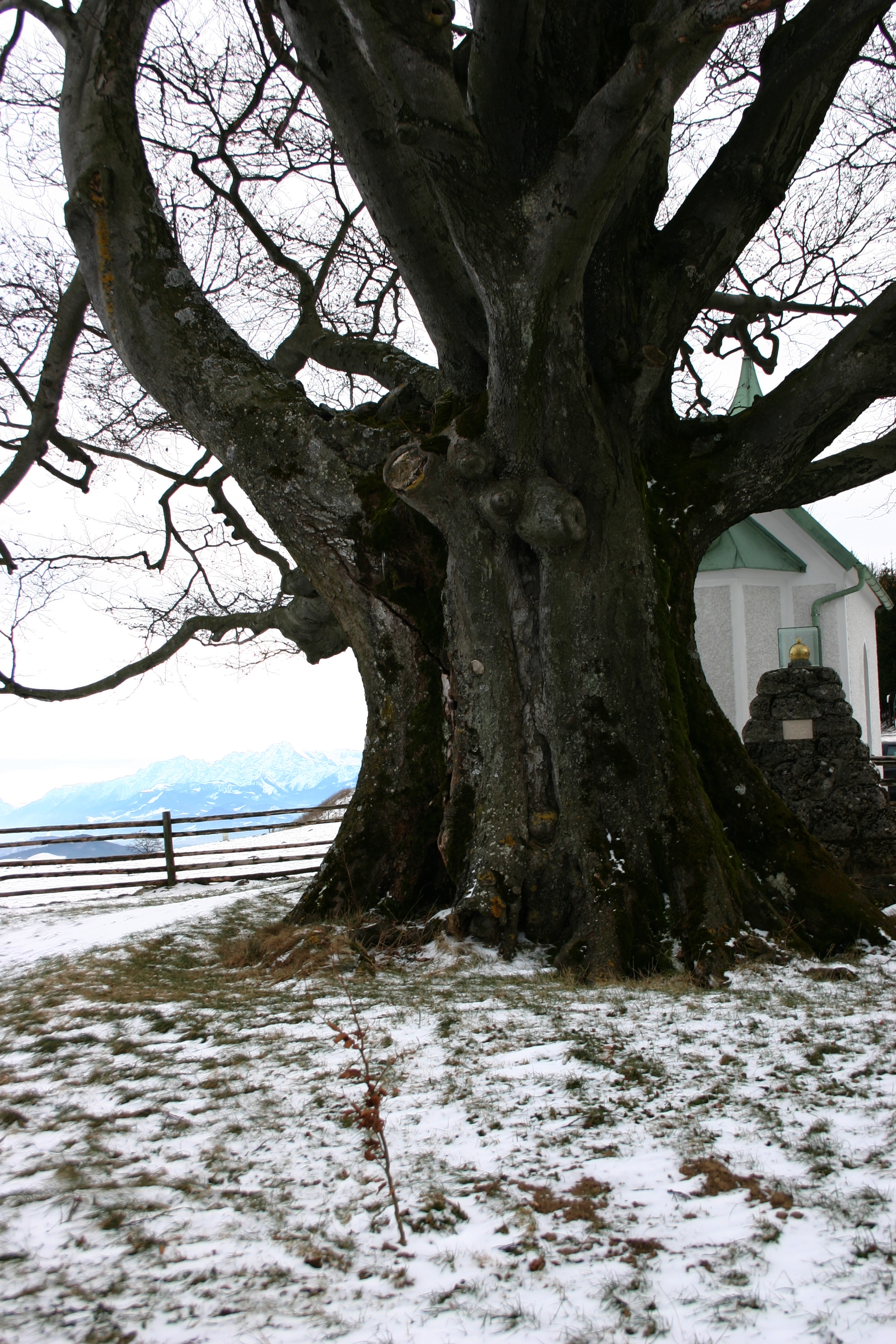 Kaiserbuche auf dem Haunsberg mit vergoldeter Krone und Kapelle gepflanzt am 29. August 1868 zur Erinnerung an der Besuch von Kaiser Josef II. im Jahre 1779, fotografiert am 25. Dezember 2003